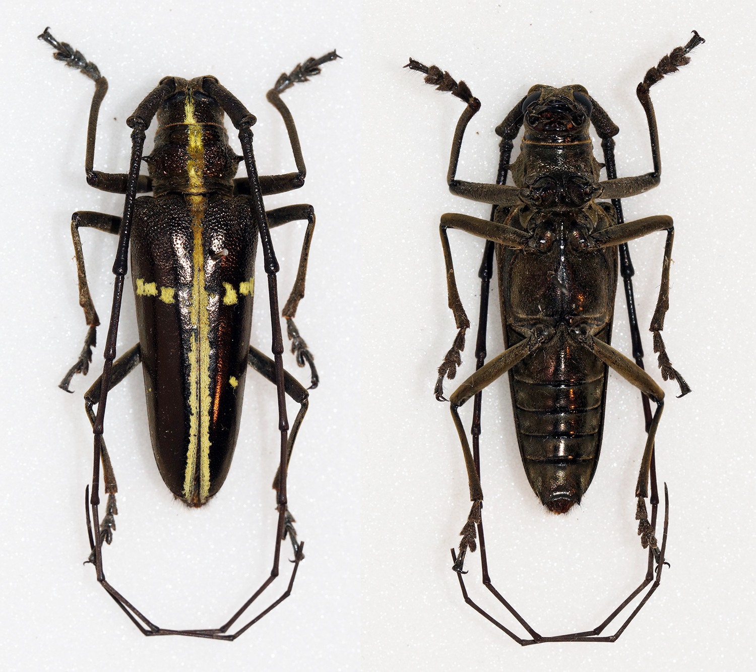 Bates,1872 Sex: Male Data: 06-2005 - Costa Rica Size: 36mm